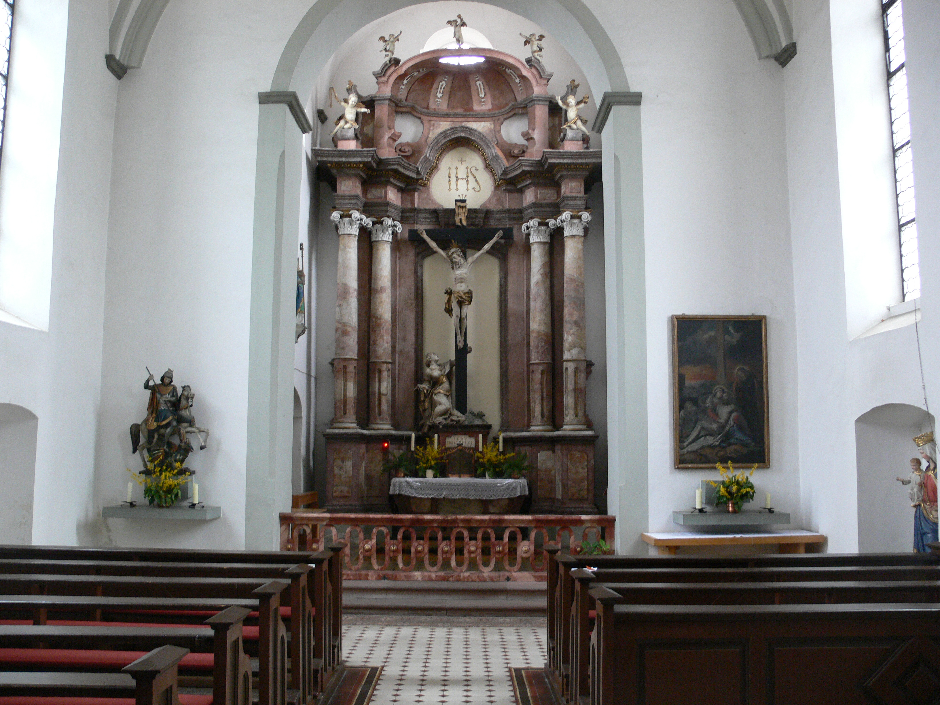 Georgskapelle am Montfortplatz,Tettnang, Bodenseekreis Innenansicht mit Hochaltar aus der Werkstatt Joseph Anton Feuchtmayers (ehemals in der Schlosskapelle des Neuen Schlosses in Tettnang)